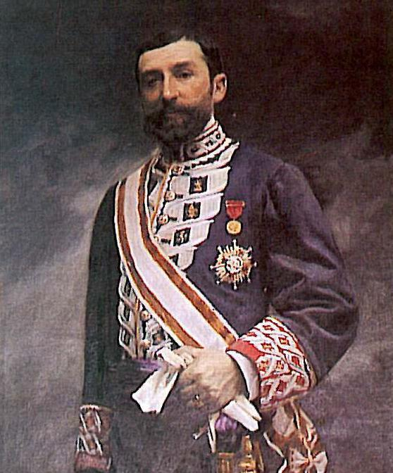 Foto sobre el cuadro de Manuel Burgos situado en el Ayuntamiento.